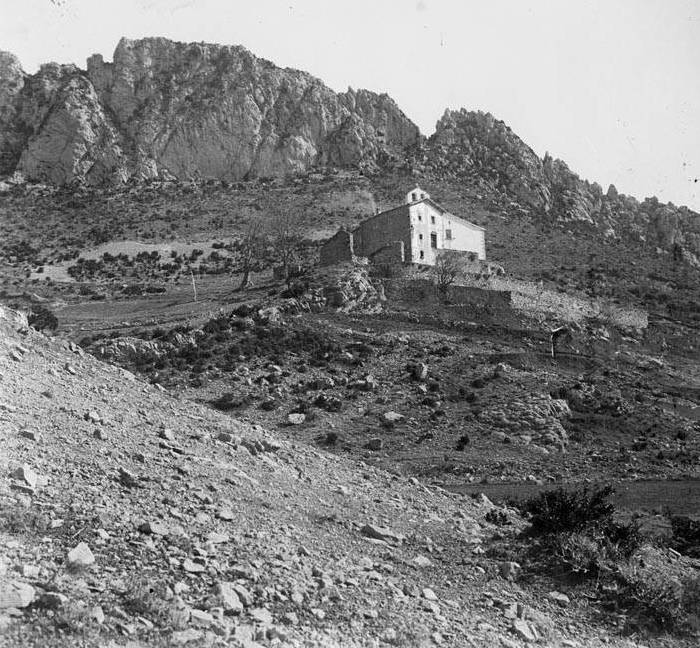 Imatge